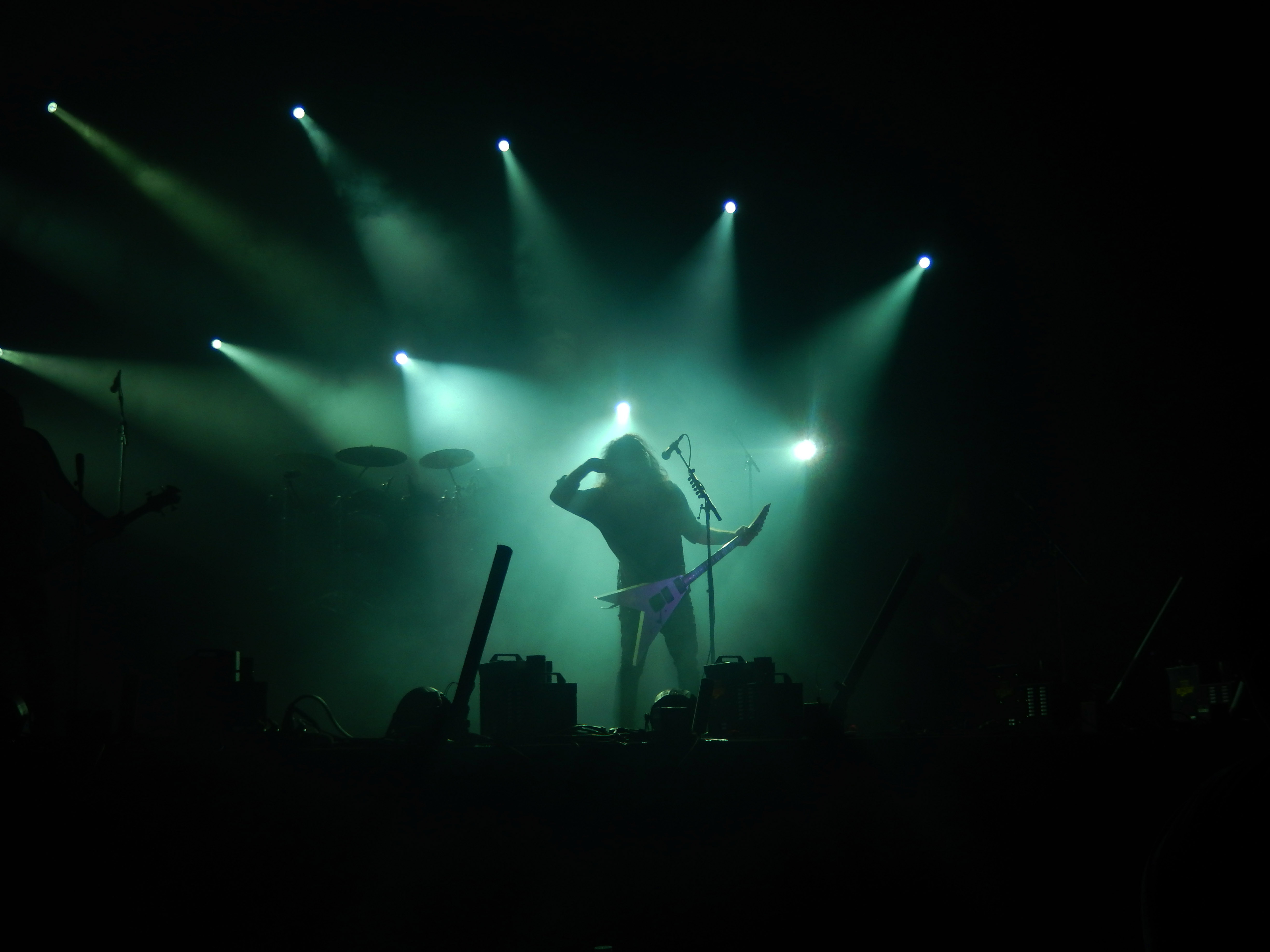 Mille Petrozza (Kreator) au Motocultor en 2017.